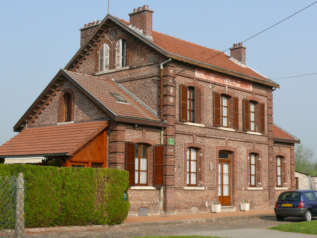 Croissy-sur-Celle : La gare de l'ancienne Ligne Beauvais - Amiens